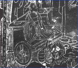 Pyörillä kulkeva tuoli kiinalaisessa kuvalaatassa